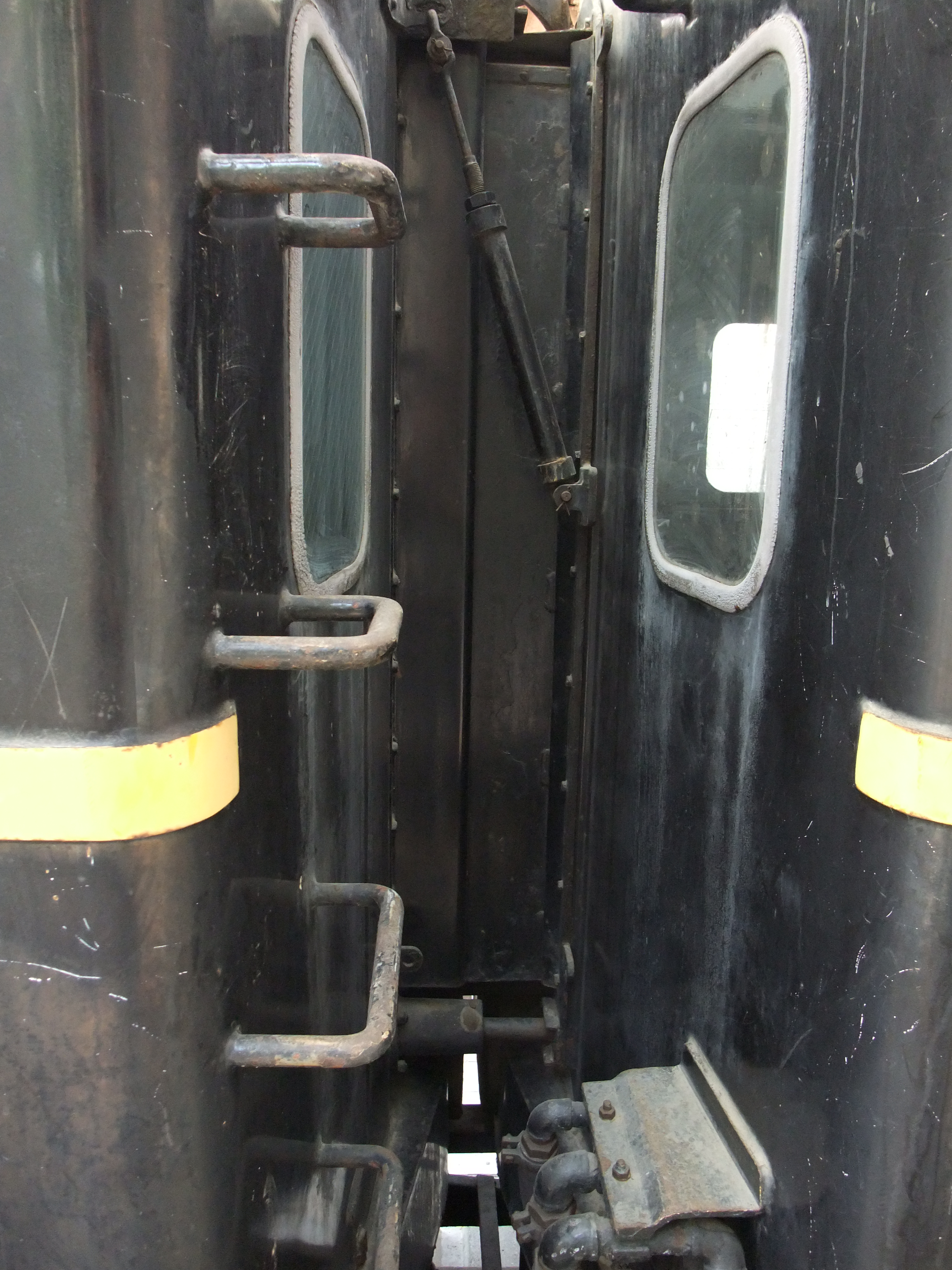 EH10 連結部分 (許可を得て撮影)